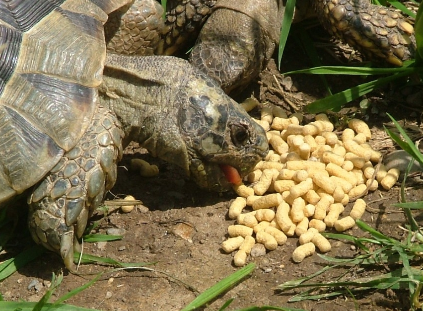 Schildkrötenfütterung mit Pellets